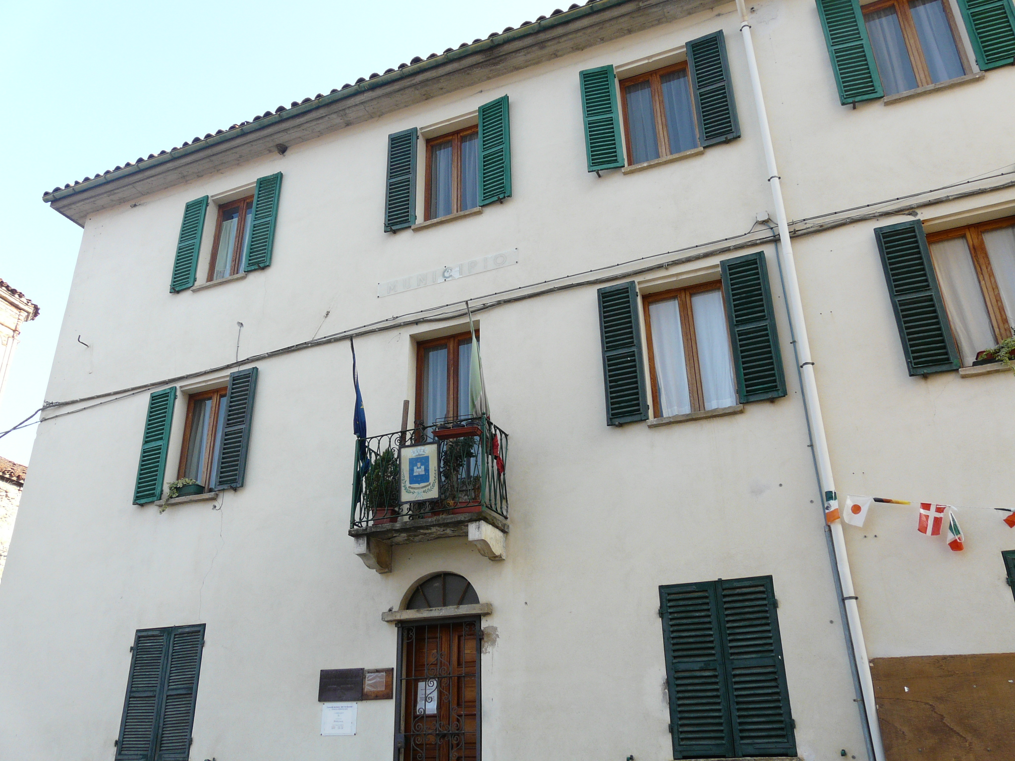 Municipio di Massimino, Liguria, Italia